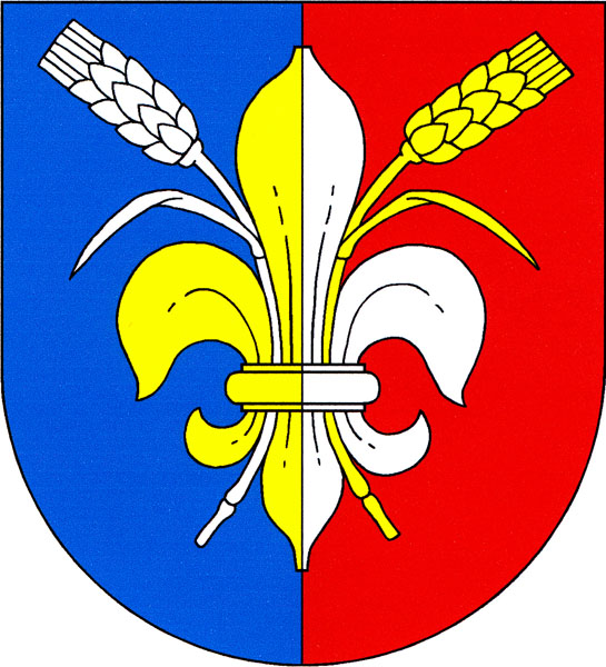 Znak obce Únehle (okres Tachov)